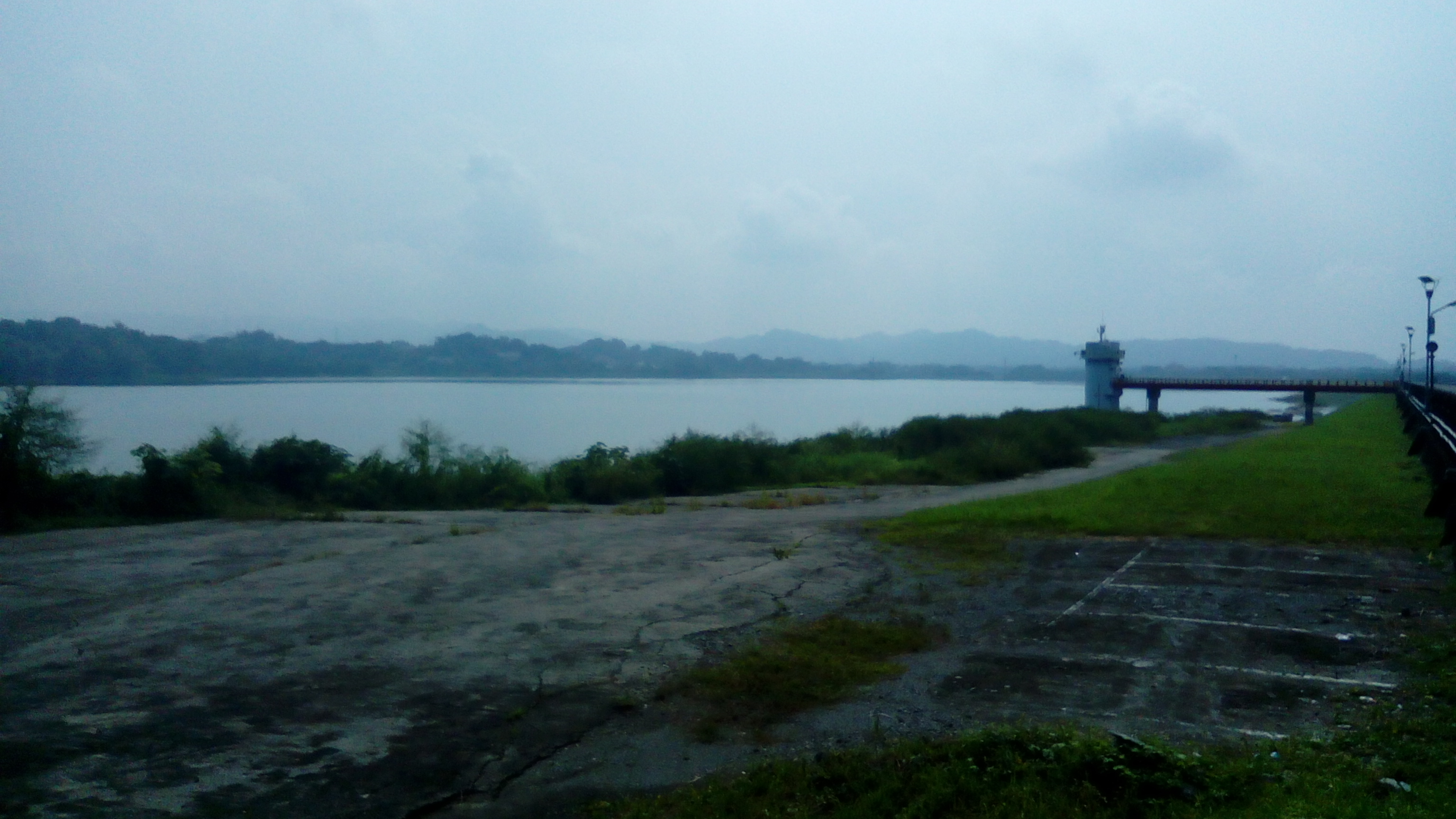 同上